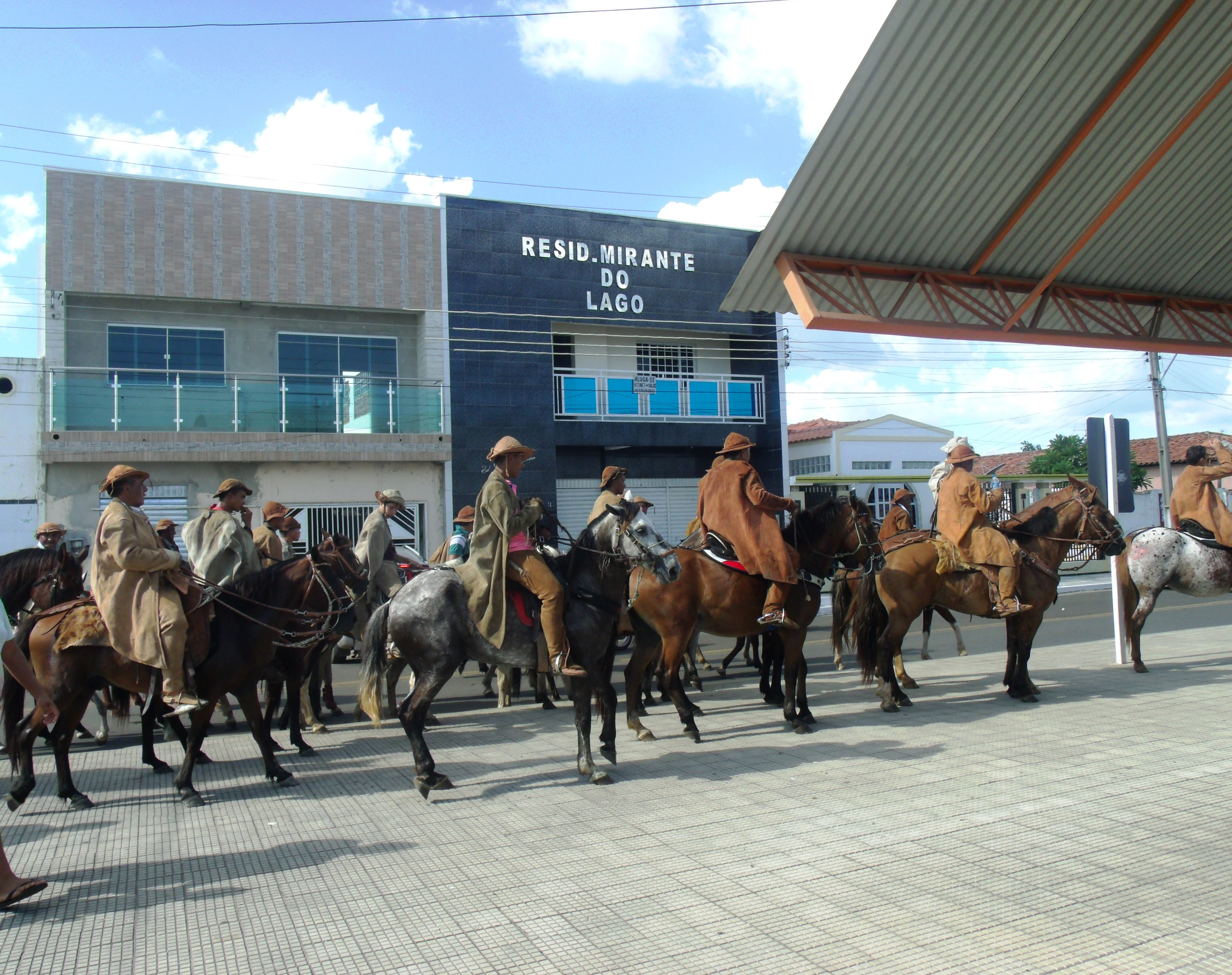 Desfile de Vaqueiros em Campo Maior, no Piauí. Uma manifestação da cultura brasileira.